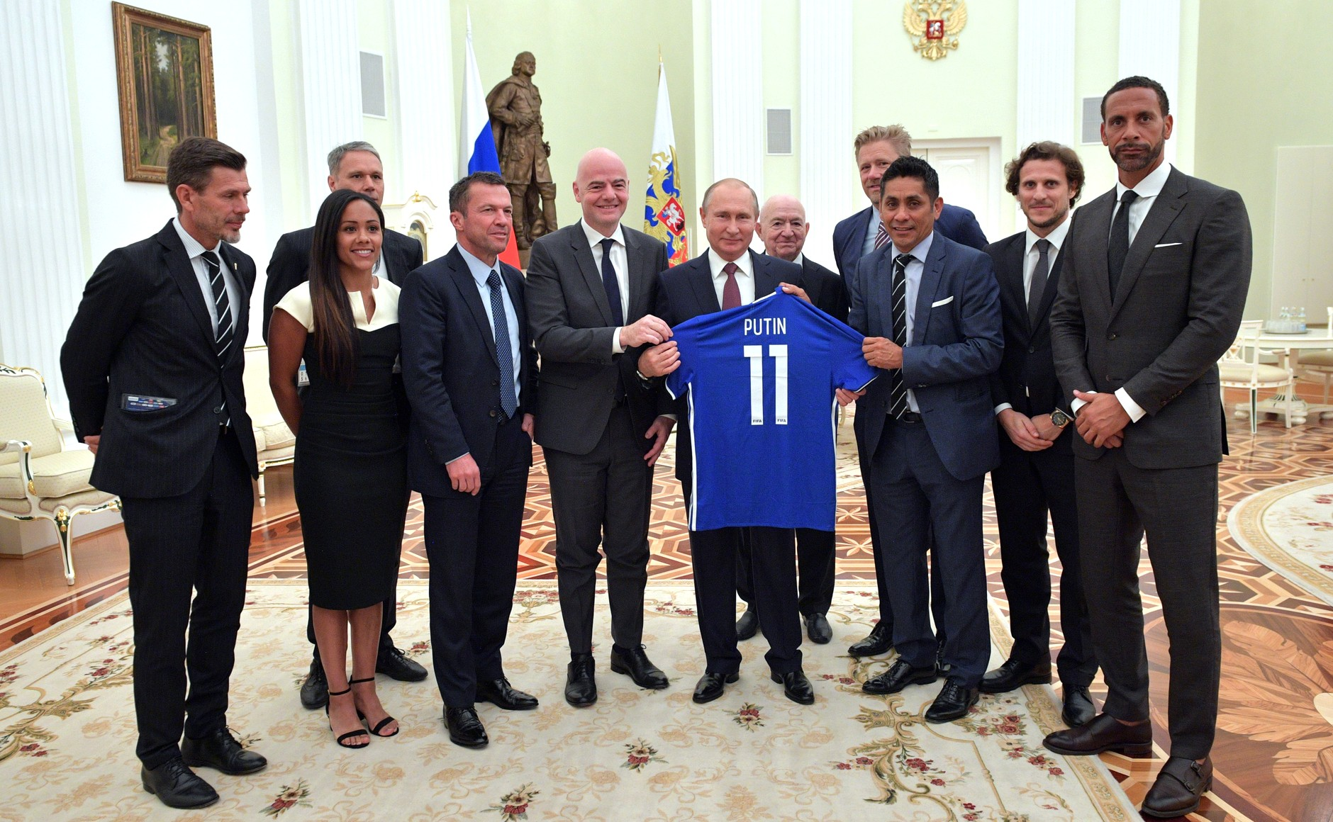 Встреча Президента Российской Федерации Владимира Путина с легендами мирового футбола